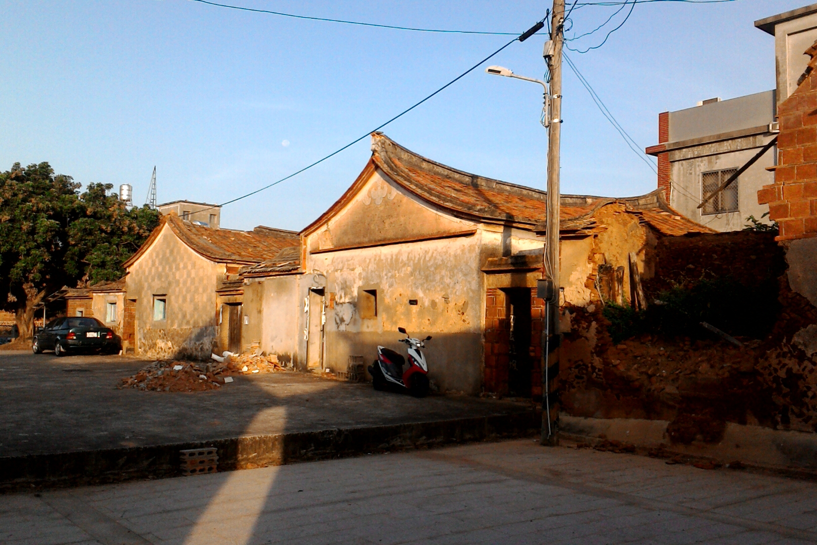 金寧鄉下堡聚落,福建省金門縣金寧鄉盤山村